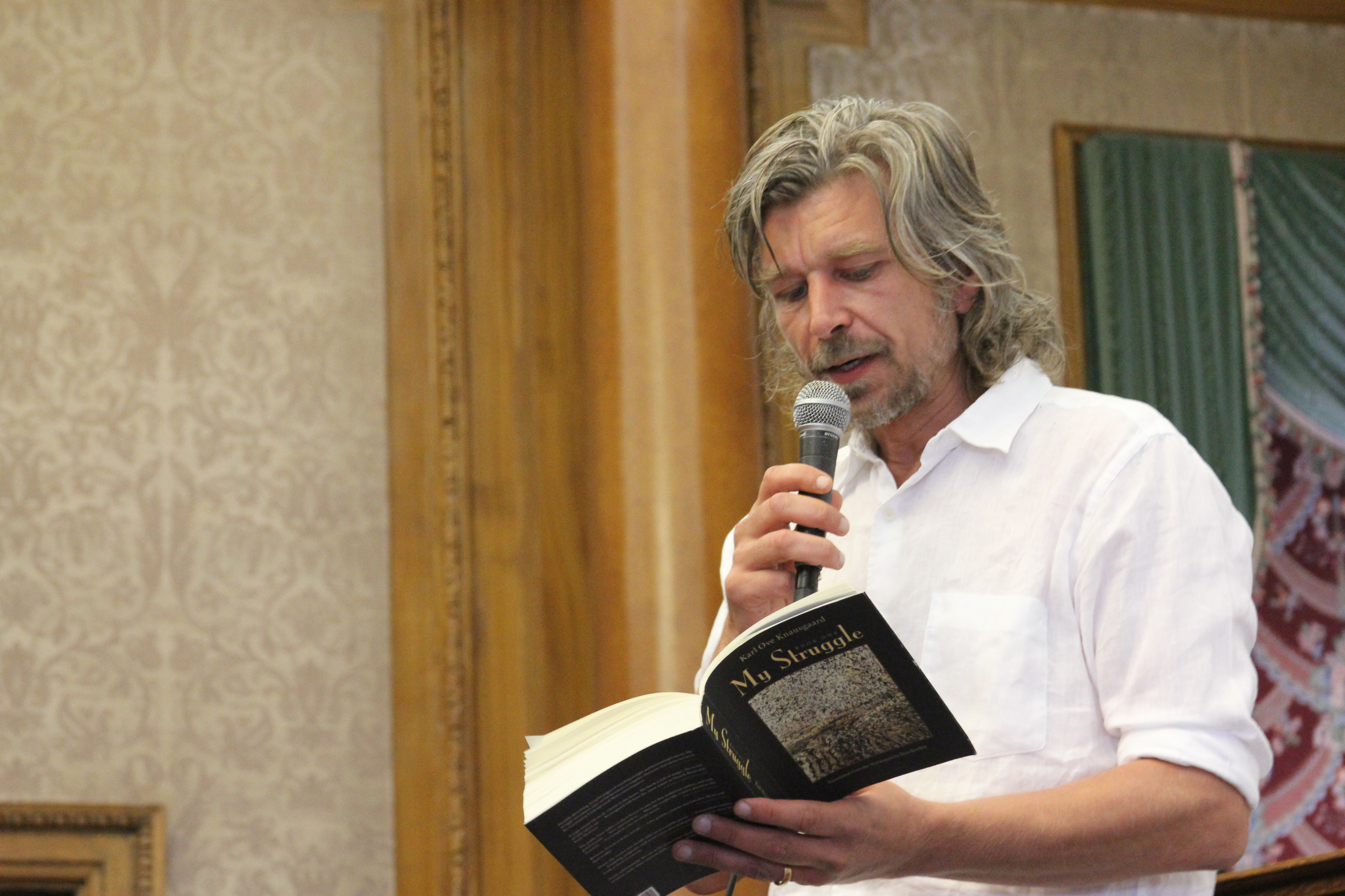 Brooklyn Book Festival